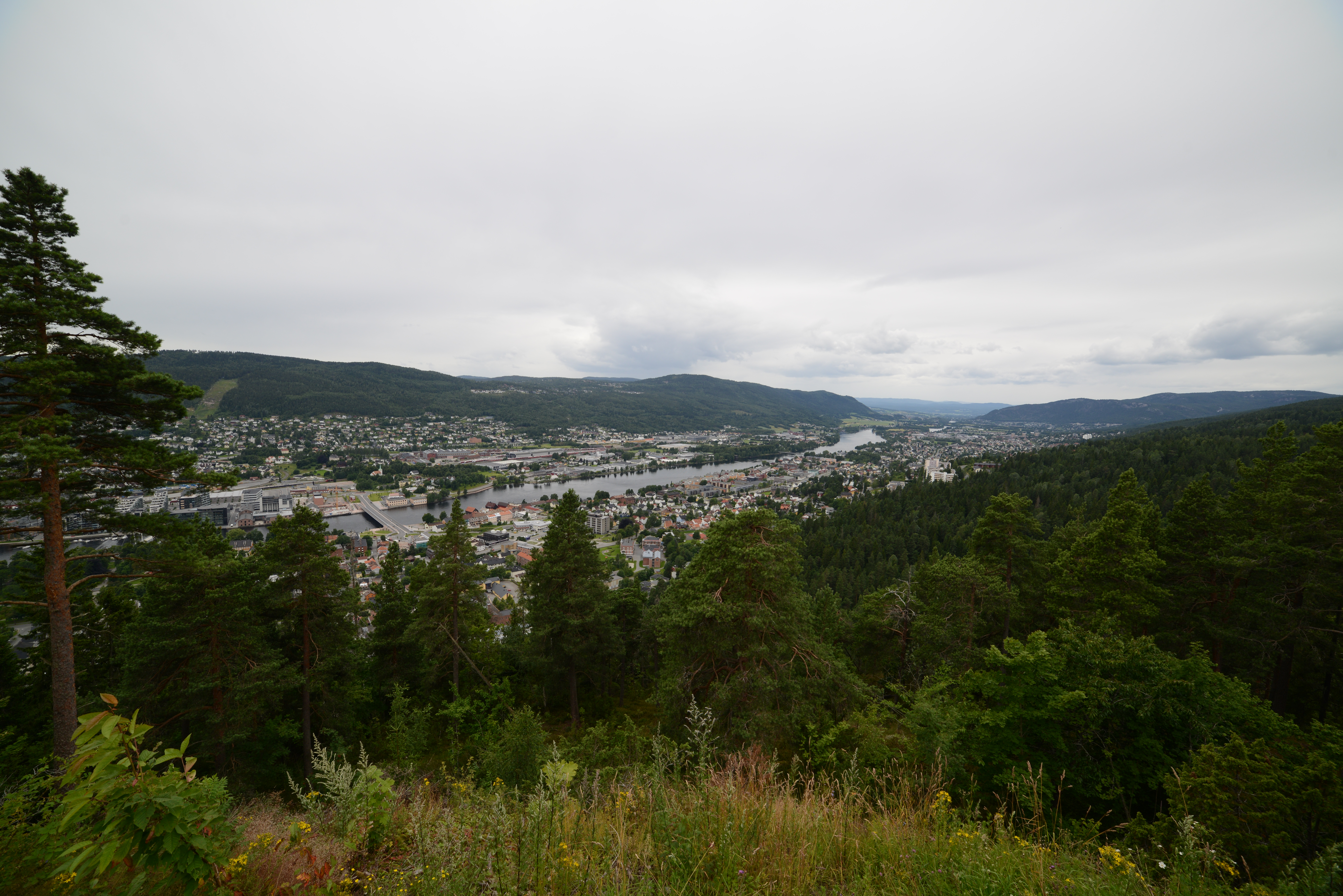 Bragernesåsen østre batteri